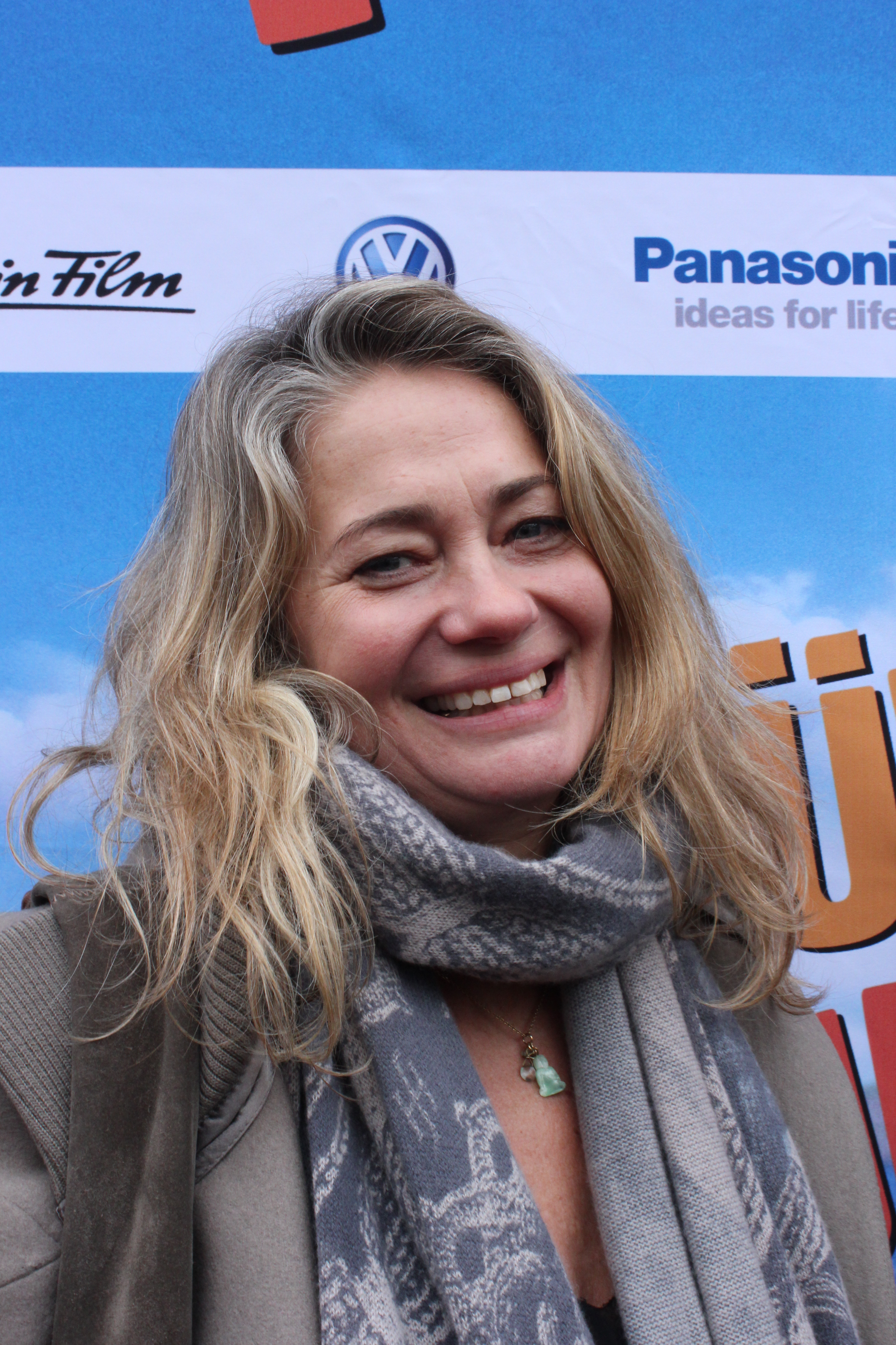 Portrait-Aufnahme von Ewa Karlström bei der Schleswigpremiere des Fünf Freunde Films (28. Januar 2012).